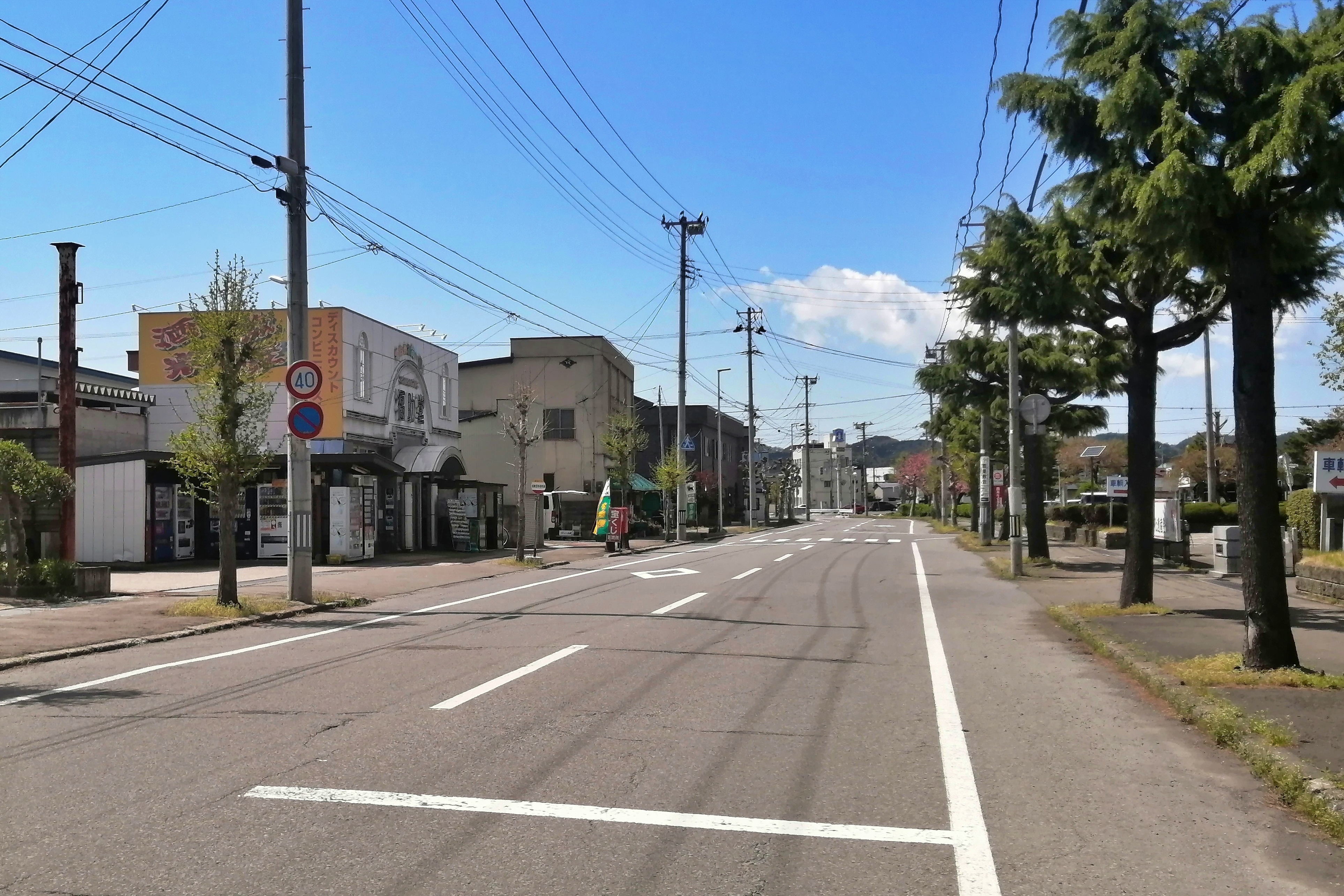 北秋田市東横町（左側）